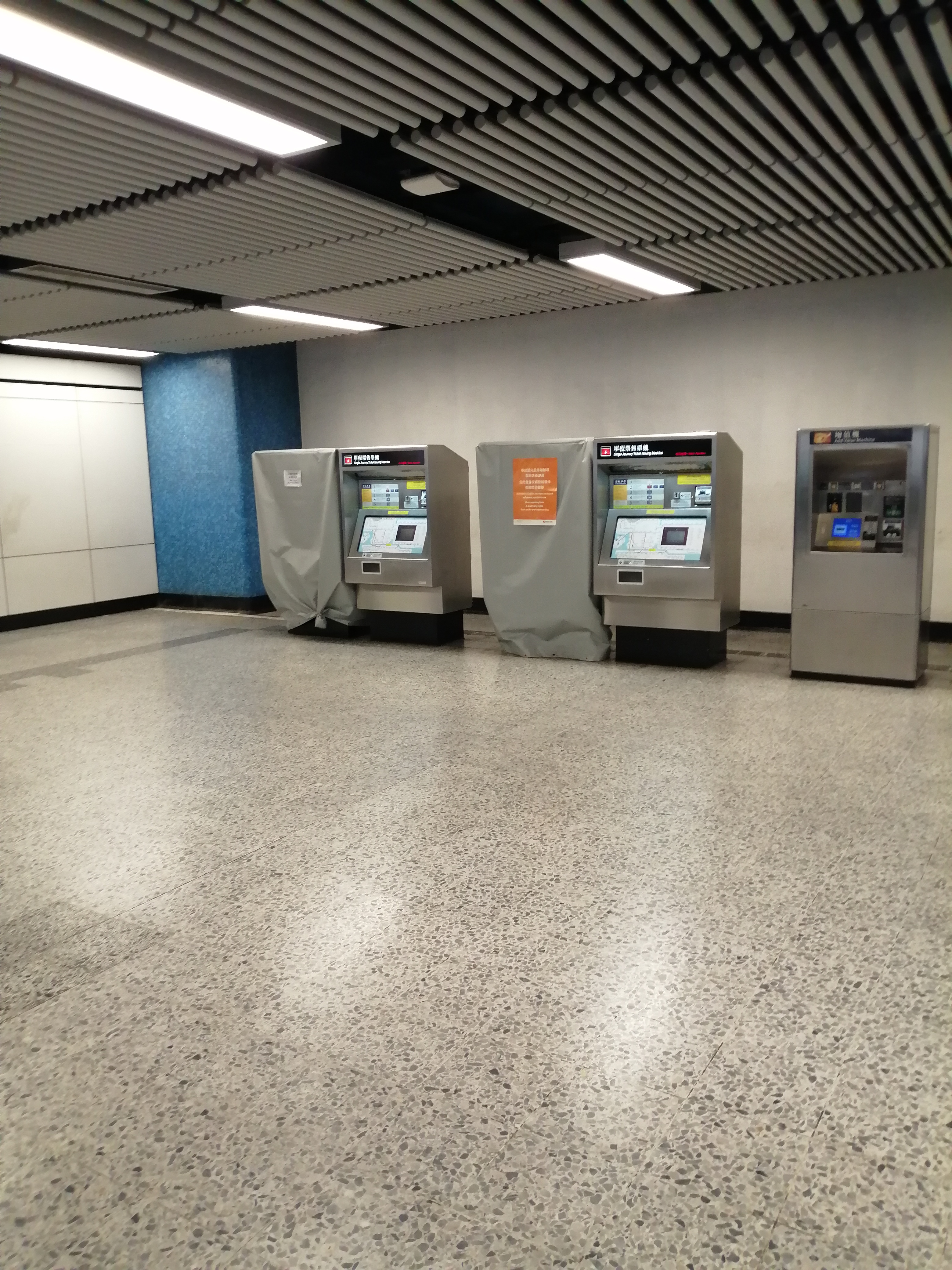 中文（香港）: 藍田站遭到破壞的售票機